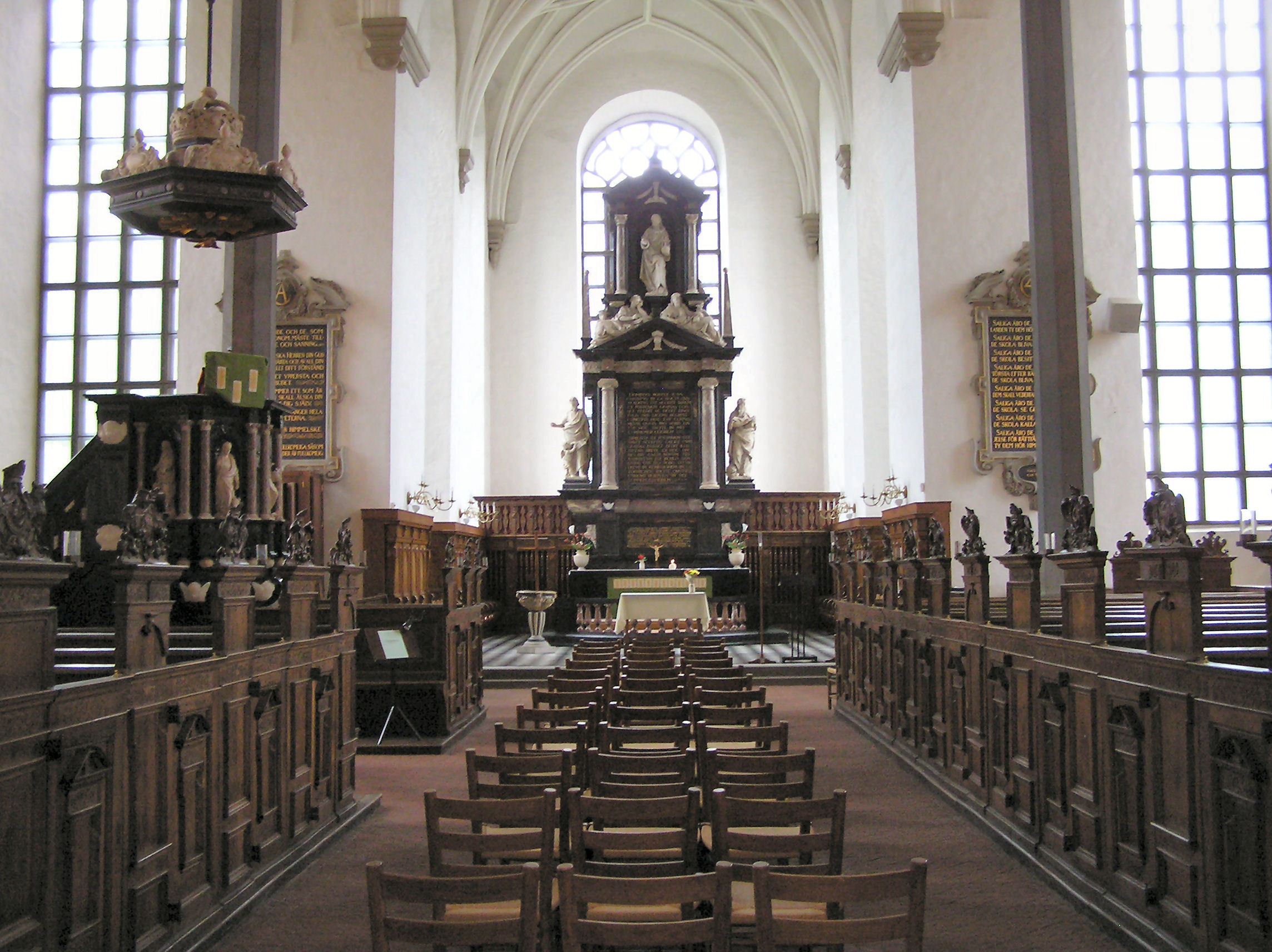 Udenfor Trefoldighedskirken i Kristianstad, Skåne